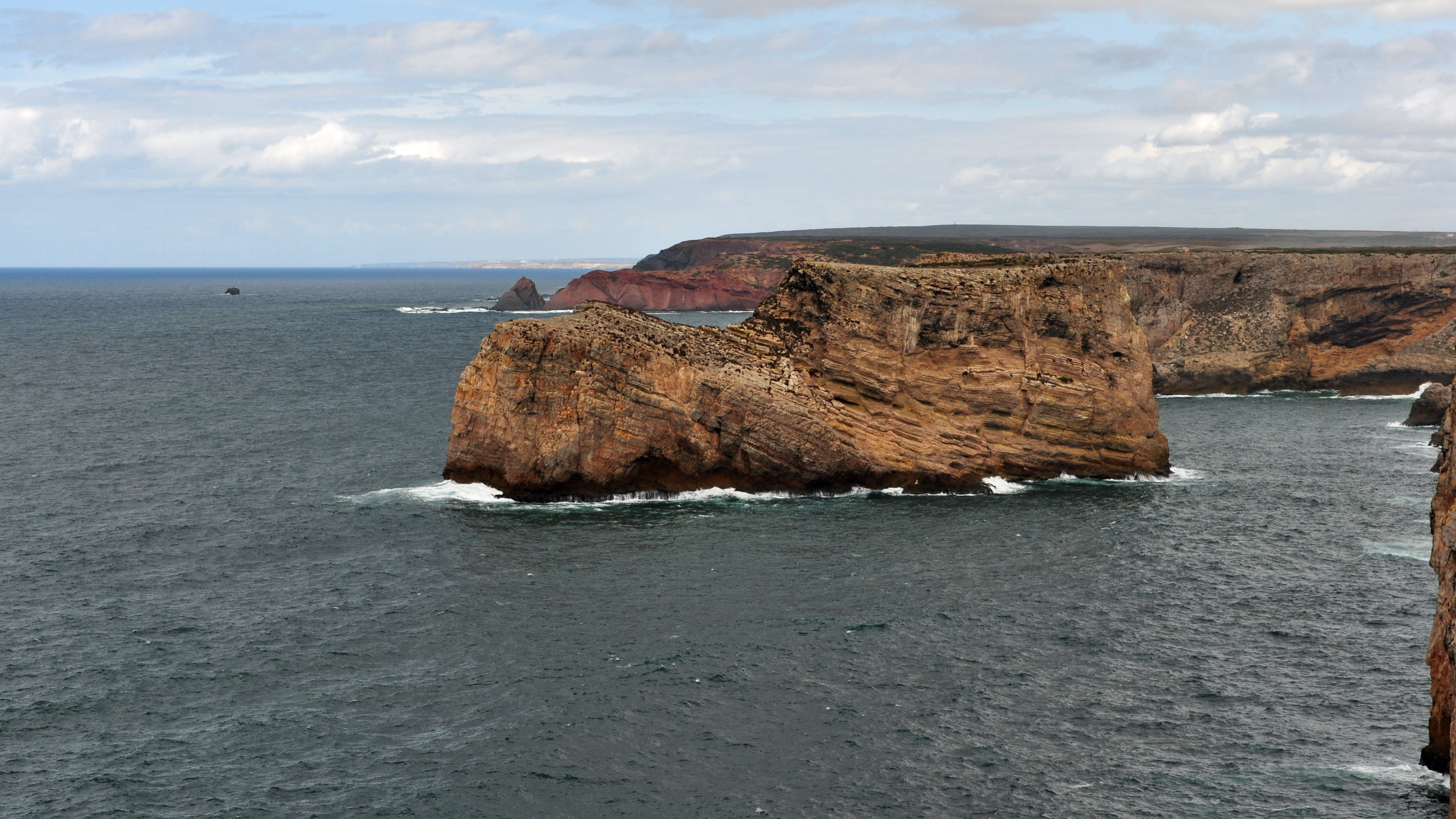 Cabo de São Vicente (2012-09-25), by Klugschnacker in Wikipedia (6)